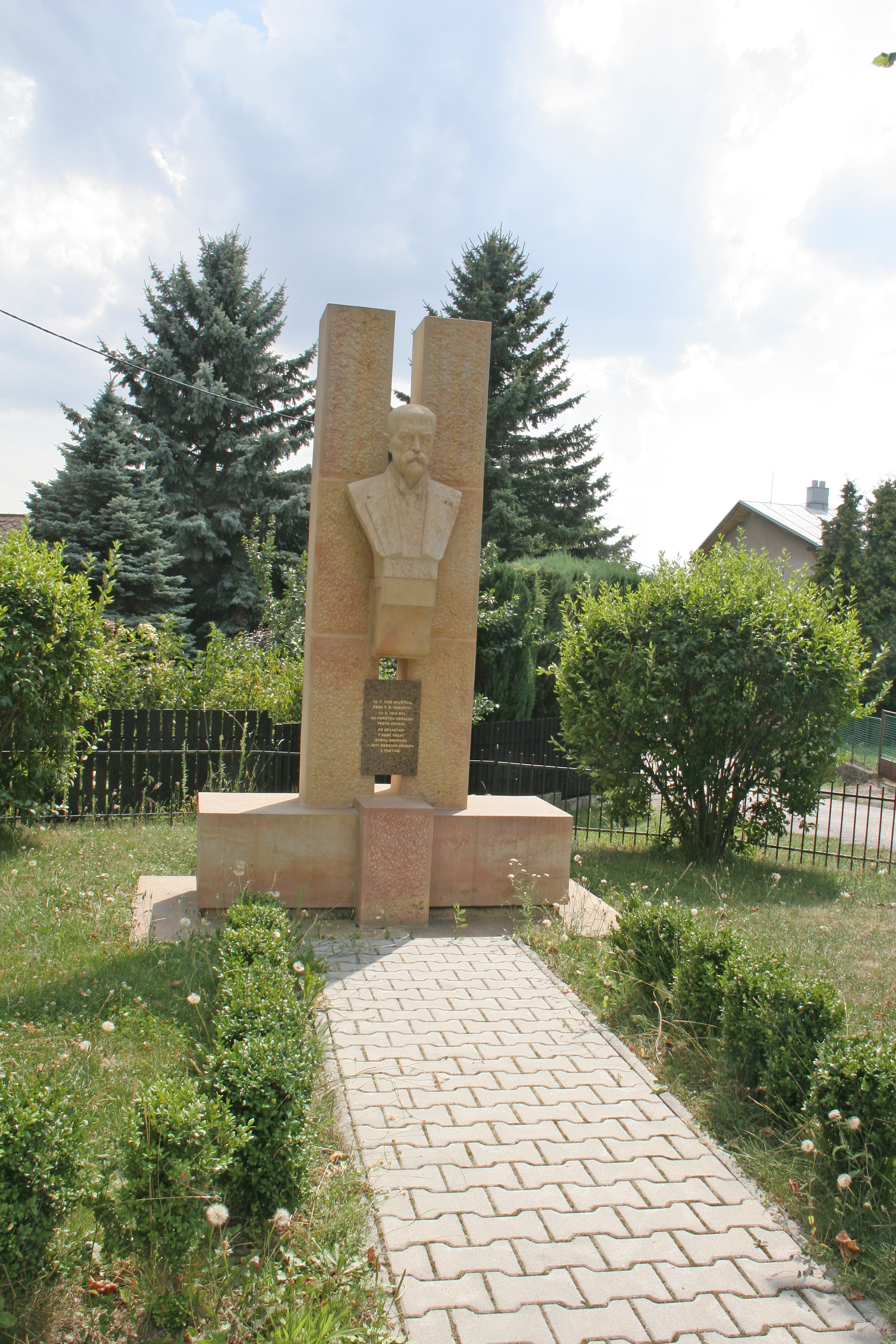 Trotina Masarykův památník